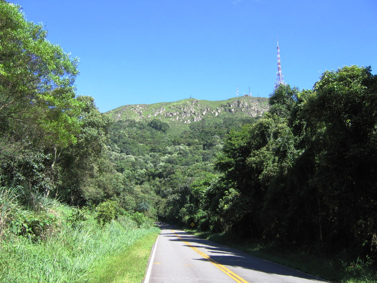 Estrada Turística do Parque Estadual do Jaraguá